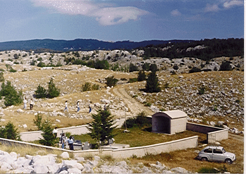 Groblje na Gornjem Dabilu u Donjem Crncu, BiH